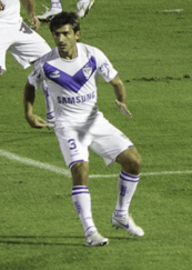 Estadio Centenario, Montevideo, Uruguay. Peñarol: Enrique Bologna; Alejandro González, Carlos Valdez, Darío Rodríguez, Aureliano Torres; Marcel Novick, Sebastián Cristóforo (m.79, Ignacio Nicolini), Fabián Estoyanoff (m.79, Sebastián Gallegos), Matías Aguirregaray; Marcelo Zalayeta y Juan Manuel Olivera (m.65, Carlos Núñez). Entrenador: Jorge Da Silva. Vélez Sarsfield: Sebastián Sosa; Gino Peruzzi, Fabián Cubero, Sebastián Domínguez, Emiliano Papa; Iván Bella (m.85, Agustín Alioni), Francisco Cerro, Fernando Gago (m.29, Lucas Romero), Federico Insúa; Ezequiel Rescaldani (m.72, Jonathan Copete) y Lucas Pratto. Entrenador: Ricardo Gareca. Gol: 0-1, m.86: Lucas Pratto. Árbitros: El brasileño Heber Lopes amonestó a Núñez y Cerro. Camera: Canon EOS 5D Mark II 5 ISO: 640 Published